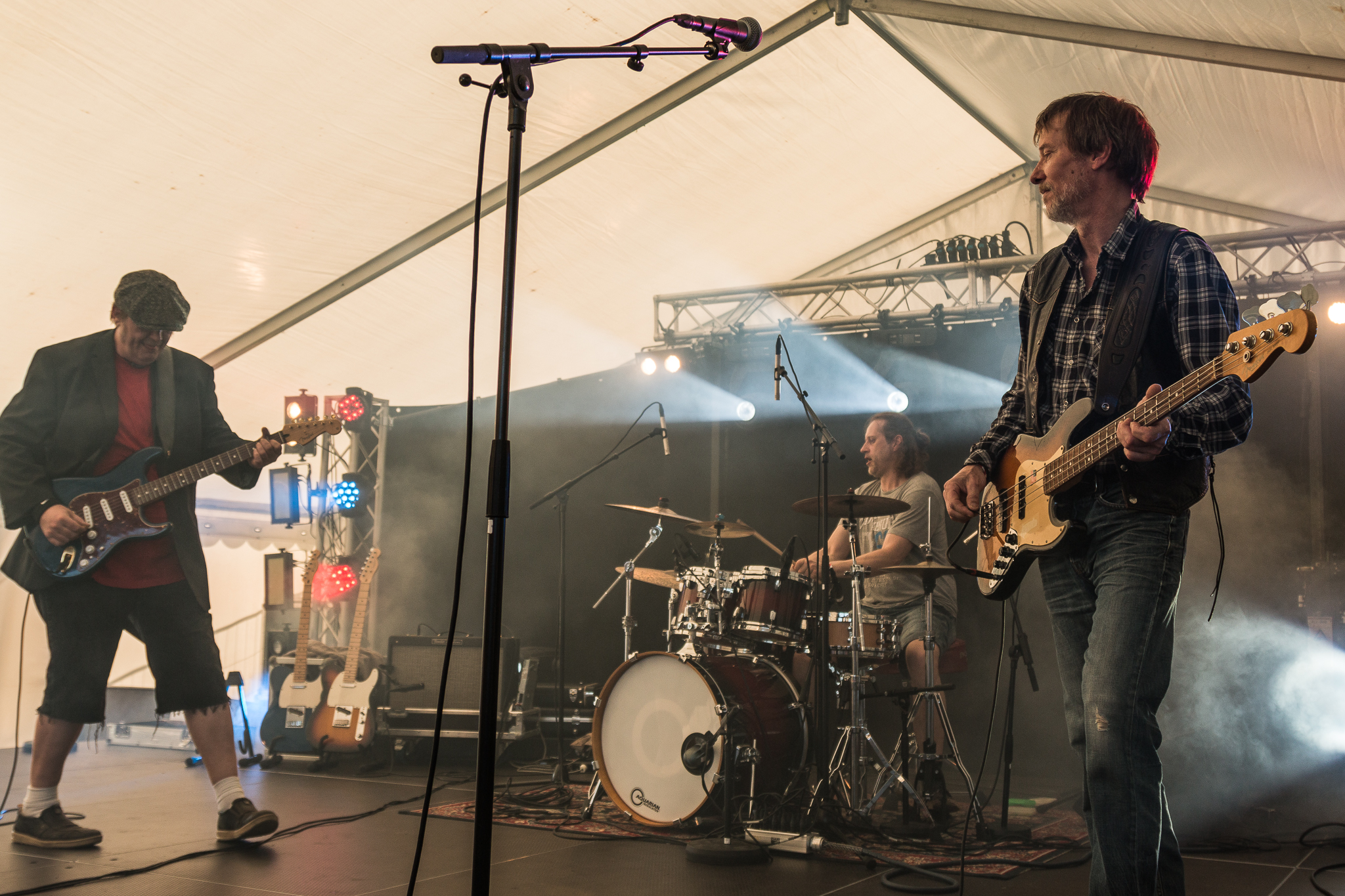 Rabalder på Herning Rocker